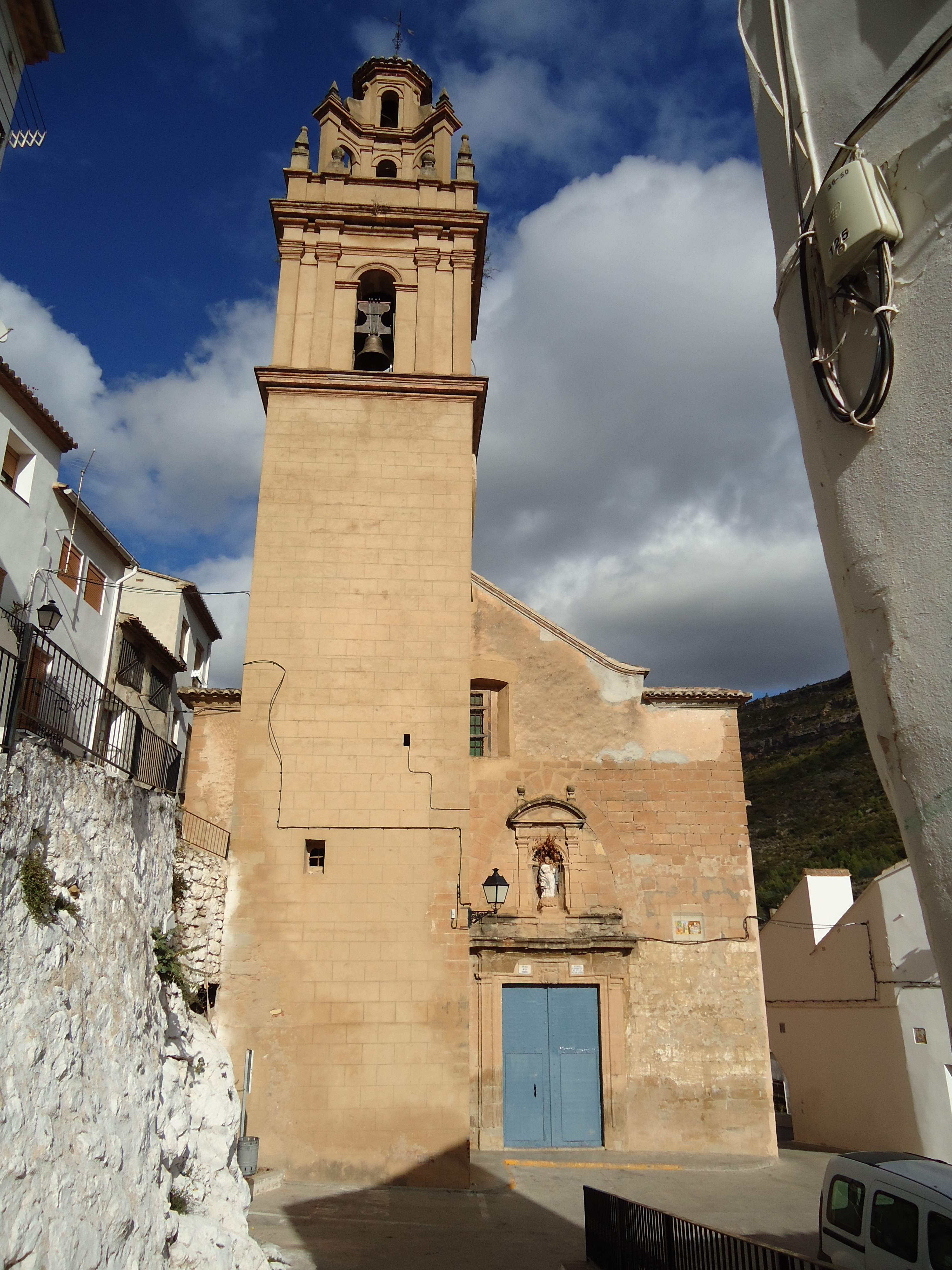 Iglesia de la Virgen de los Ángeles, Chulilla, Valencia, España.